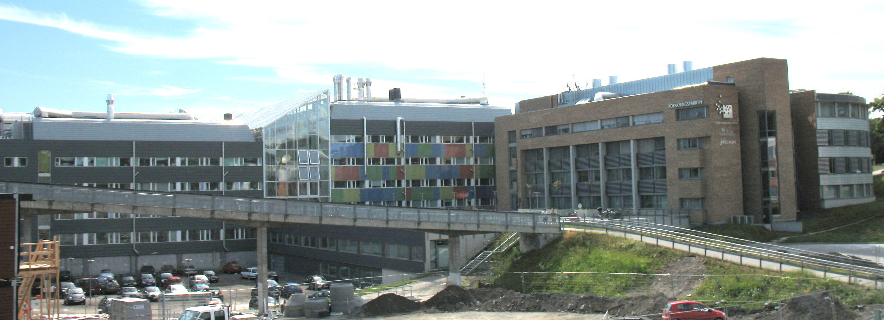 Forskningsparken i Oslo